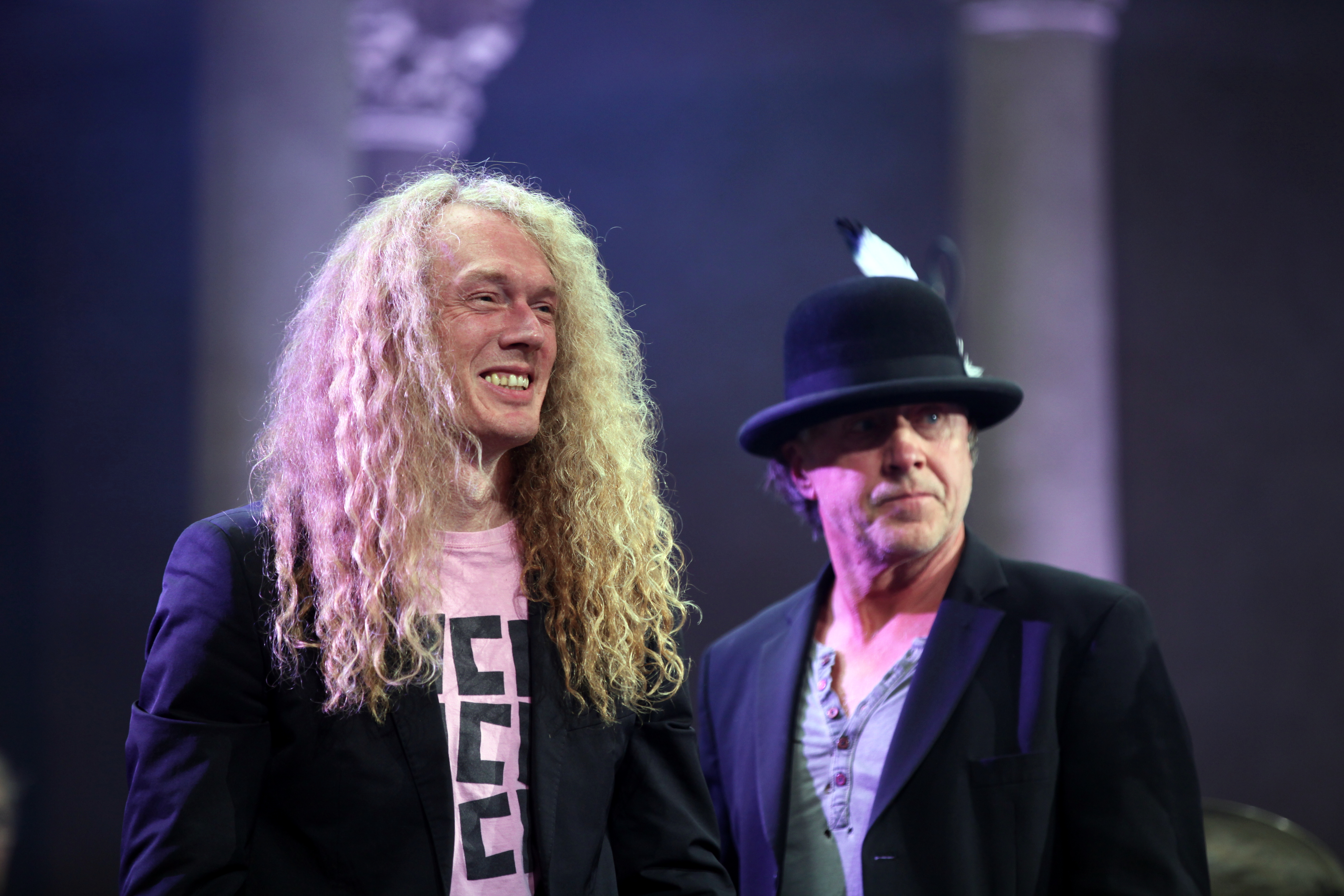 Hannes Ringlstetter mit Begleitmusikern auf dem Heimatsoundfestival 2015: Jochen Goricnik und Edgar Feichtner